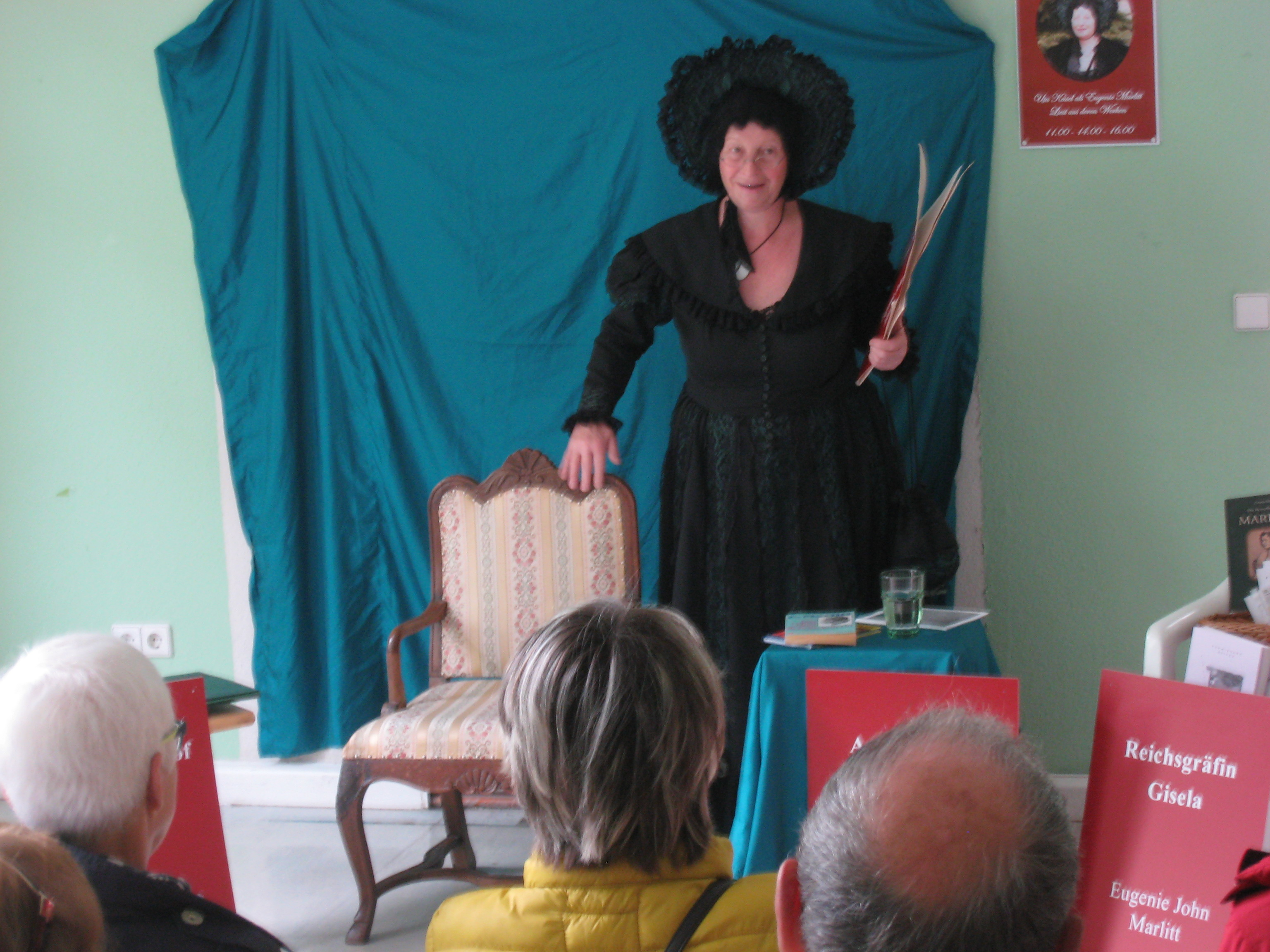 Vorleseveranstaltung aus Werken von E. Marlitt mit dem Original Marlitt-Sessel, im Rahmen des Tags der offenen Tür in der Villa Franz (Arnstadt), Mai 2014.